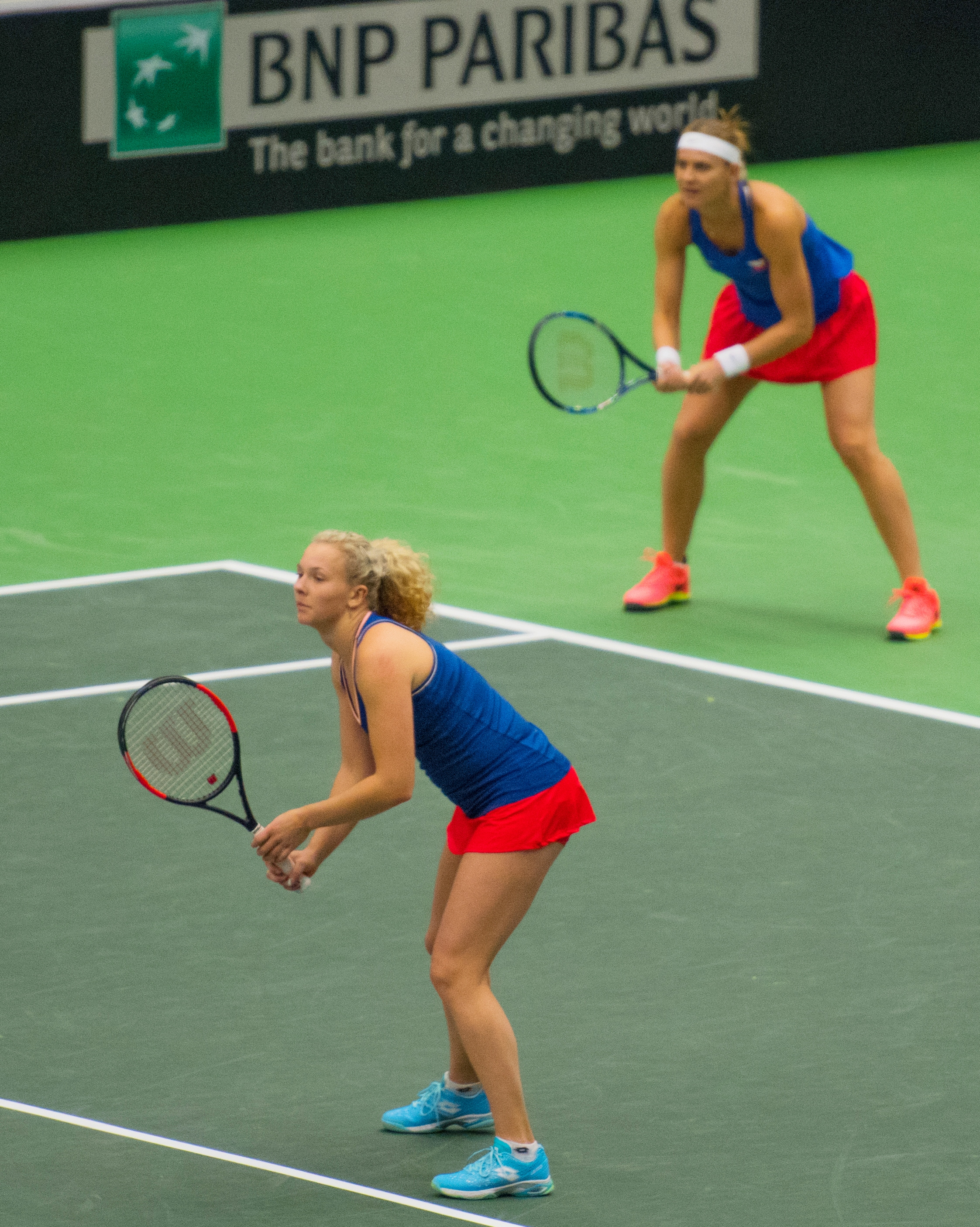 PPP_0602